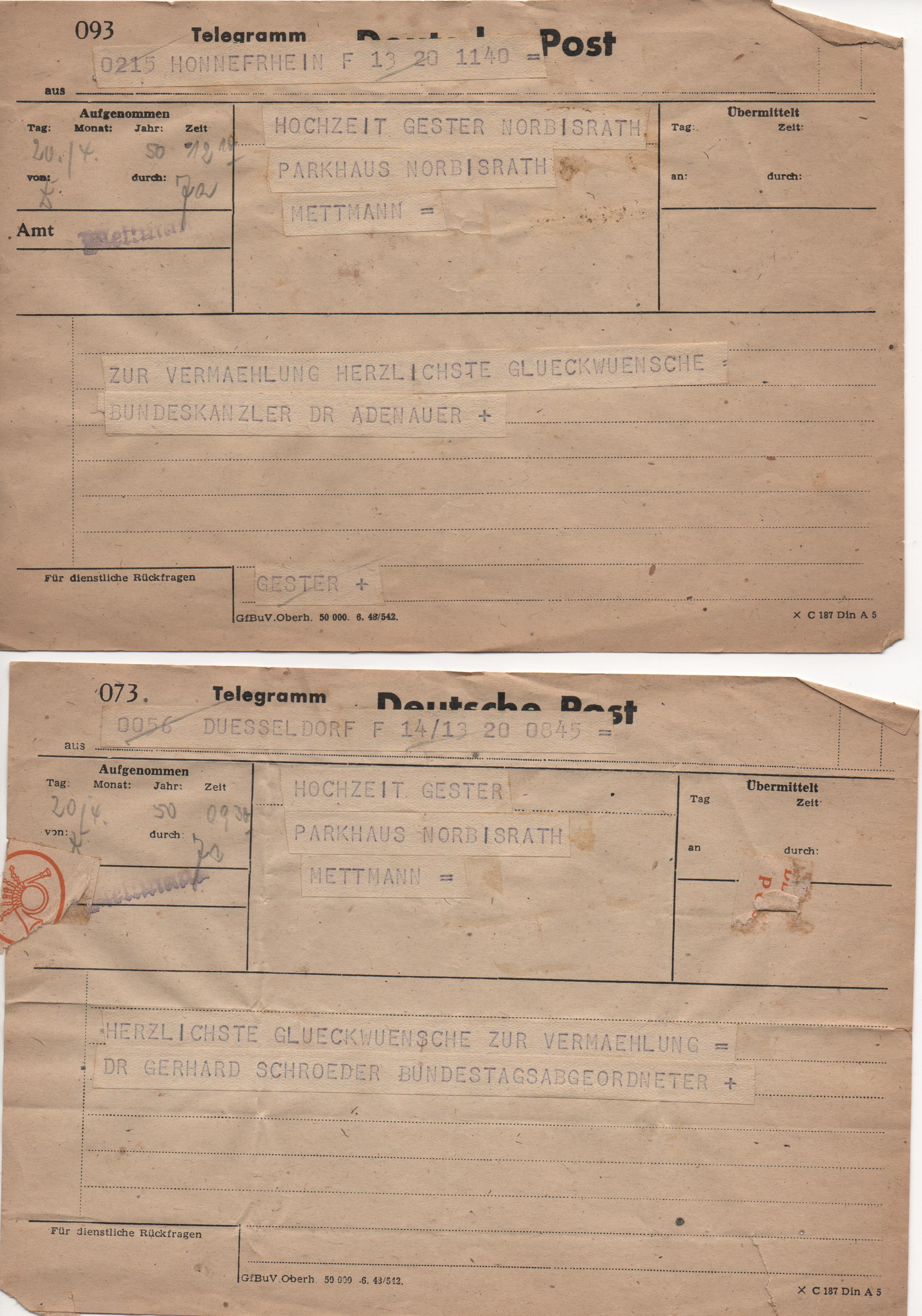 Bild von zwei Telegrammen. Bundeskanzler Dr. Konrad Adenauer und Bundestagsabgeordneter Dr. Gerhard Schröder gratulieren Herrn Kurt Gester zur Hochzeit am 20. April 1950